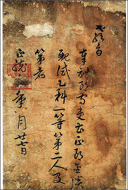 문절공 김담 과거 급제 교지